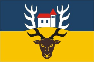 Rohenice